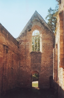 Date : fr:25 septembre 2004, vers 15 h 00 Source : photo personnelle d'archeos Description : Intérieur de l'église de l'abbaye du Pin dans la Vienne, dépourvue de voûte, prise de l'entrée NE (couloir communiquant avec les bâtiments conventuels). Style cistercien. Ambiance onirique fantastique. Autres descripteurs : Ordre cistercien ; abbaye cistercienne ; baie ; colonne engagée ; Licence